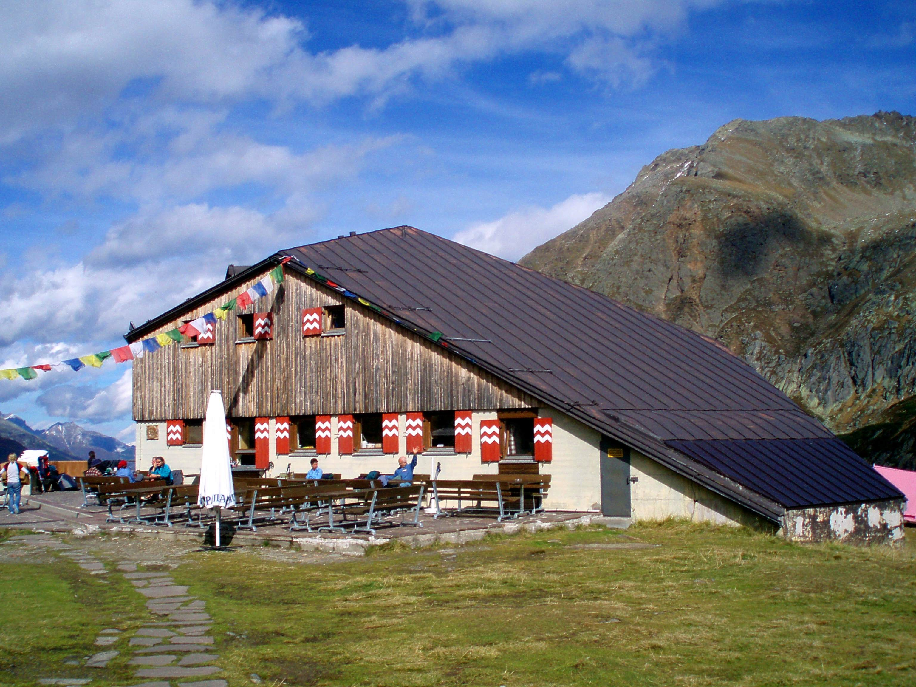 Sulzenauhütte